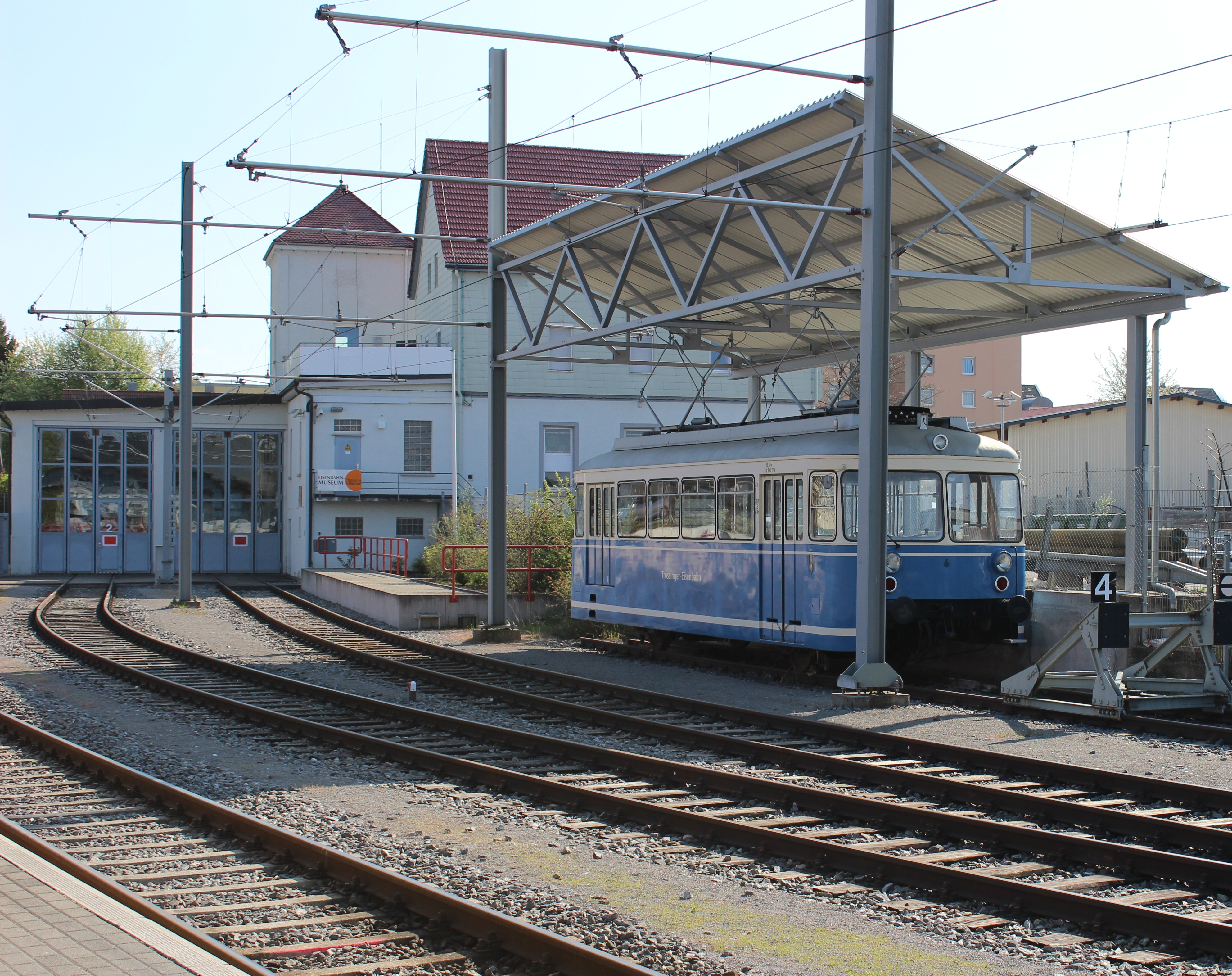 Das "Bähnle" am Trossinger Stadtbahnhof.